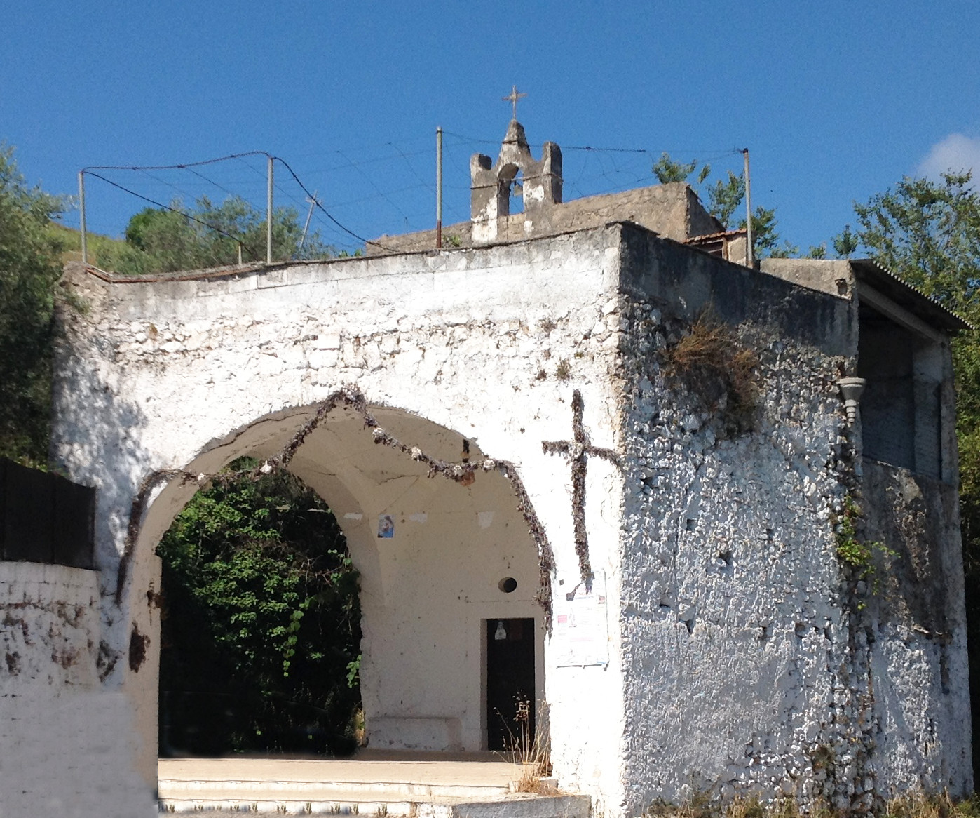 Esterno della cappella.